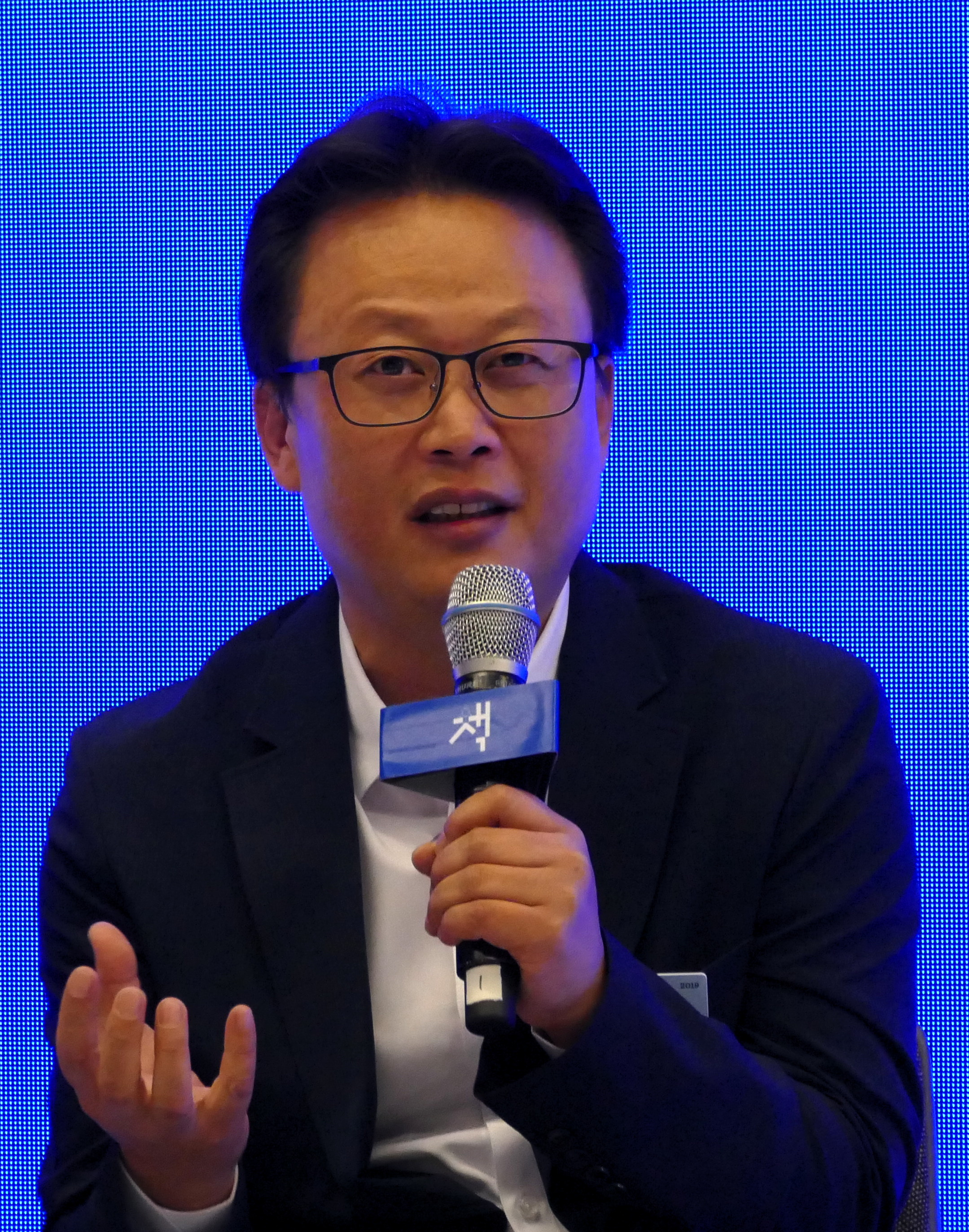 Kim Un-su på Bokmässan i Göteborg 2019.